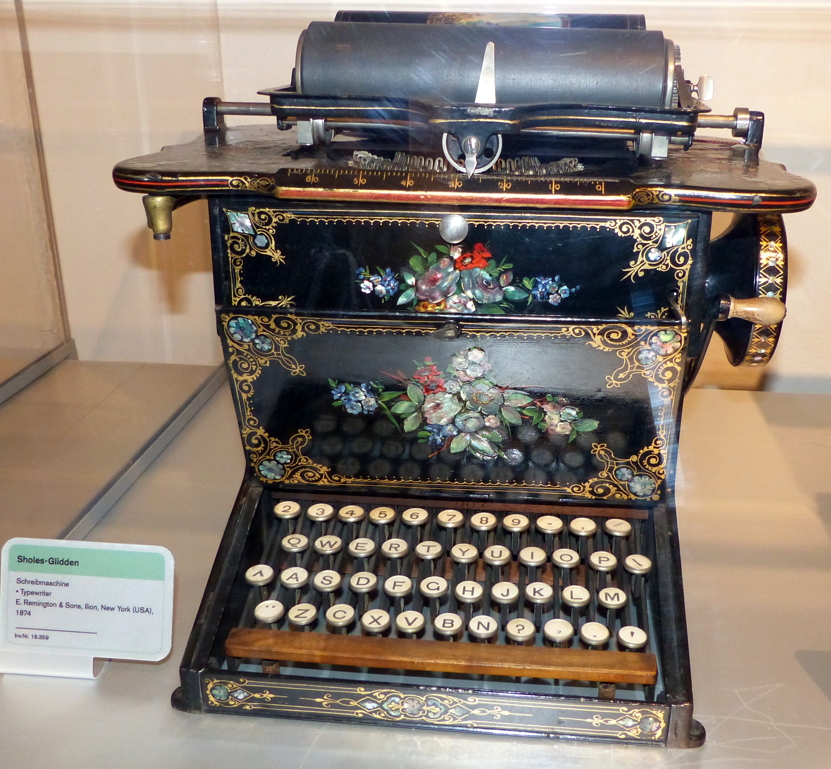 Schreibmaschine Sholes-Glidden 1874, New York; Exponat im Technischen Museum Wien